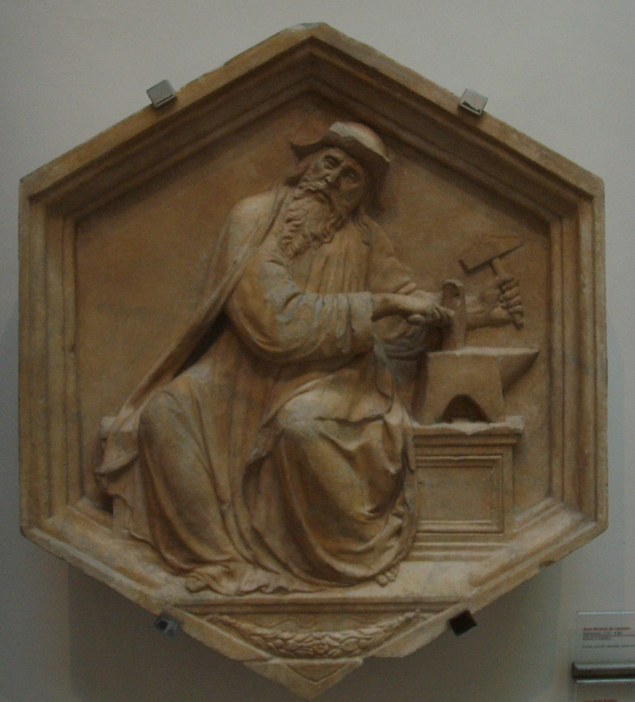 Formella 19, astrologia, luca della robbia, 1437-1439